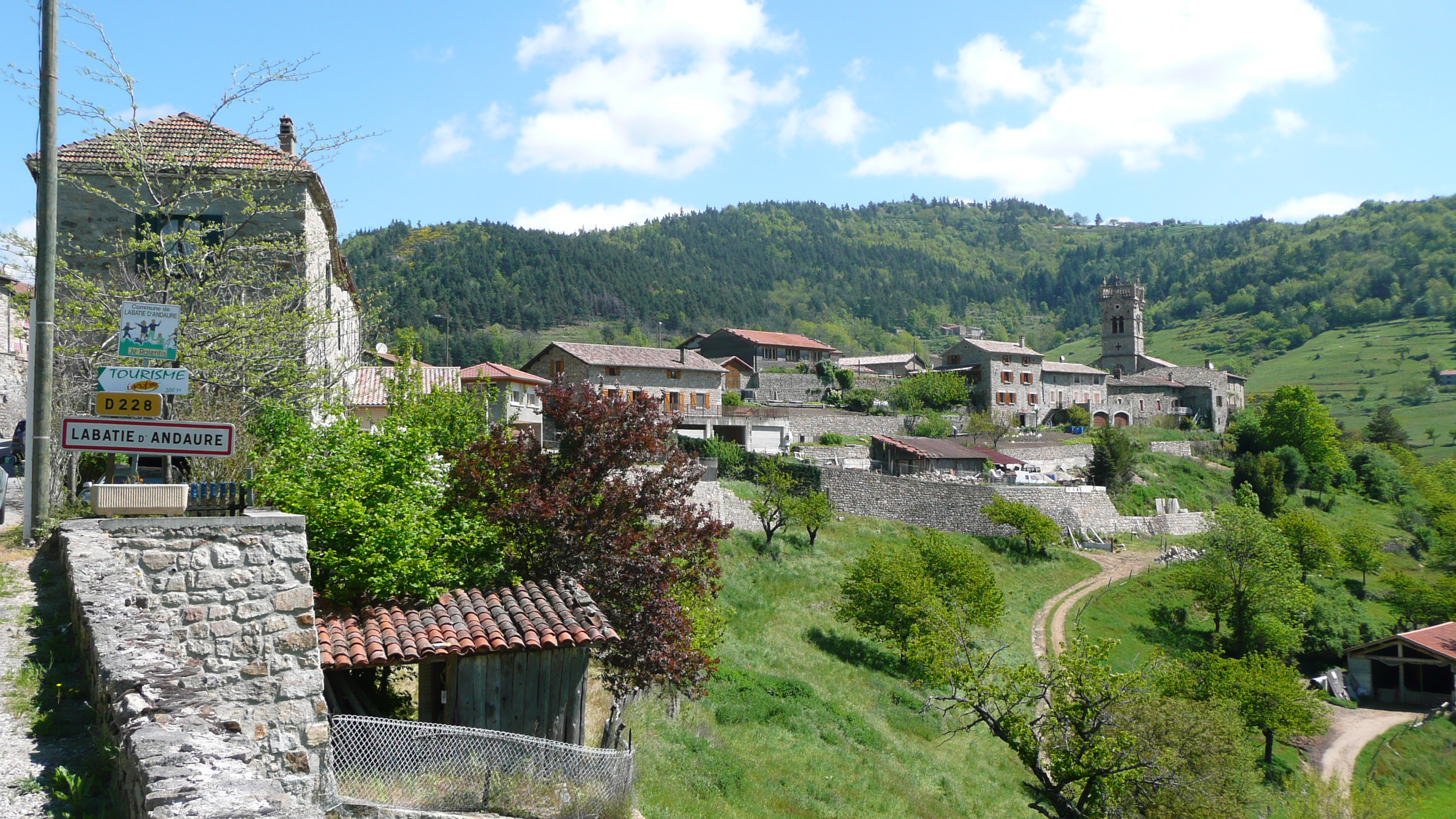 Ceci est une vue générale du village de Labatie d'Andaure, en Ardèche.